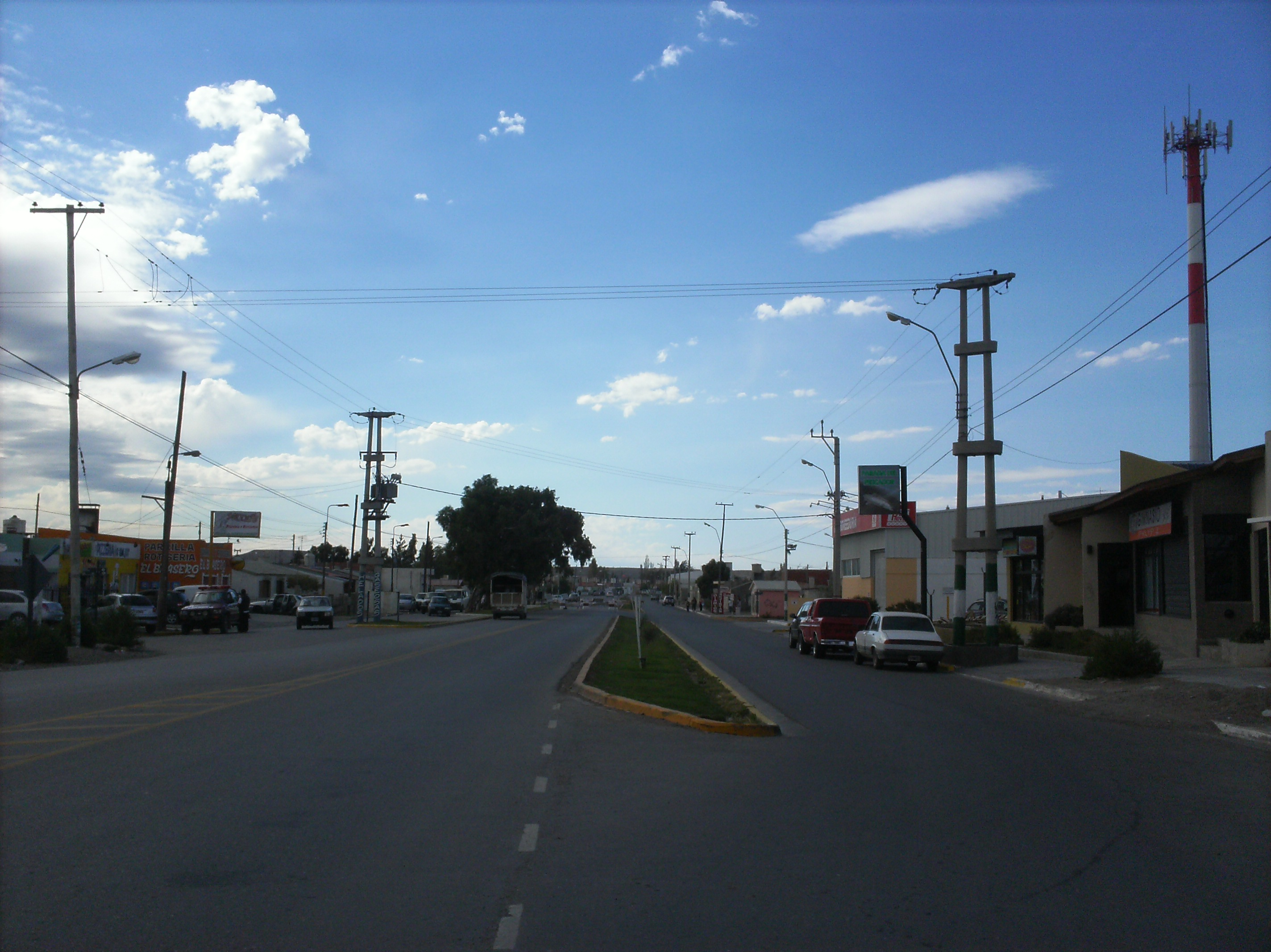 la avenida principal del barrio km 8